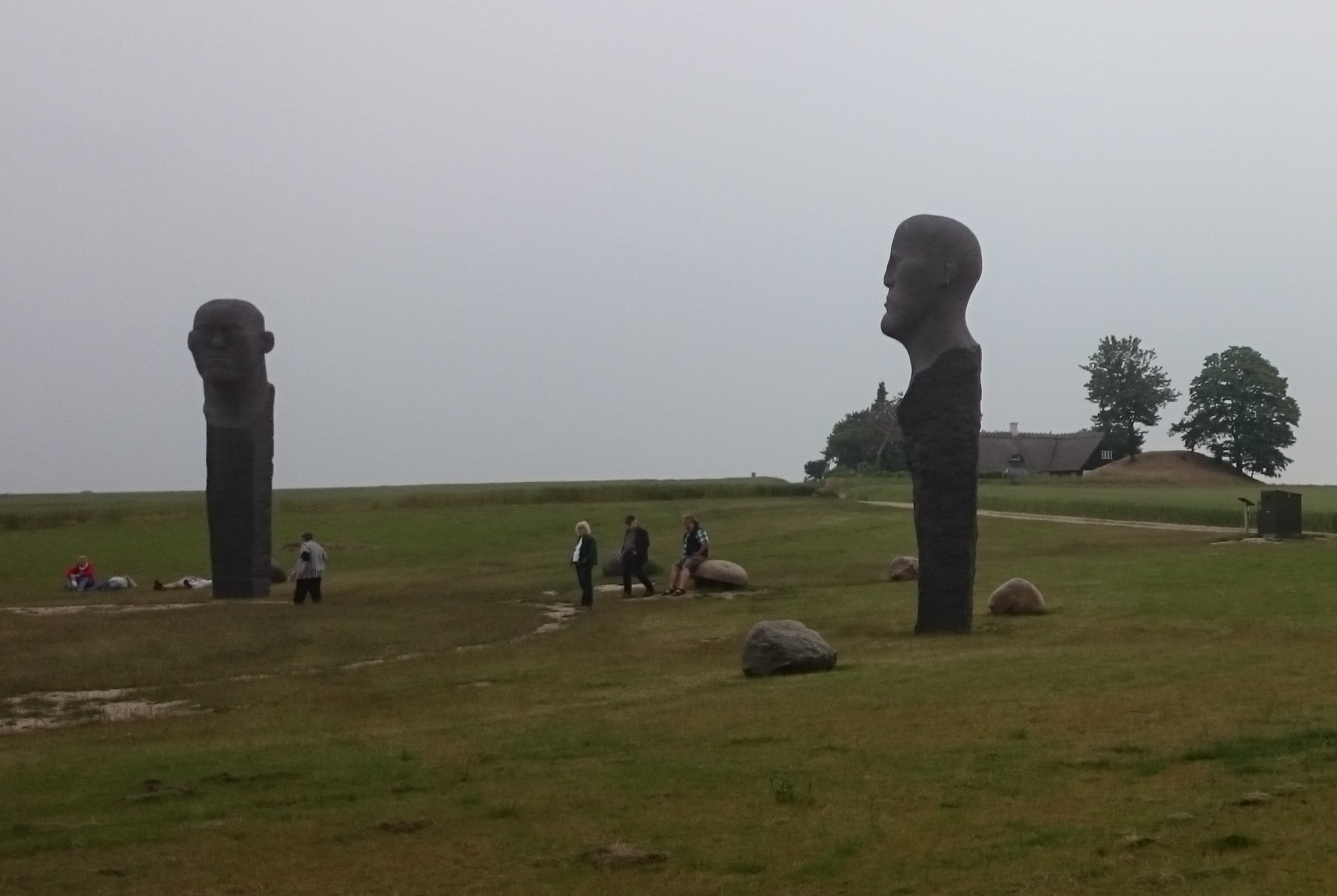 To dodekalitter i juni 2015.